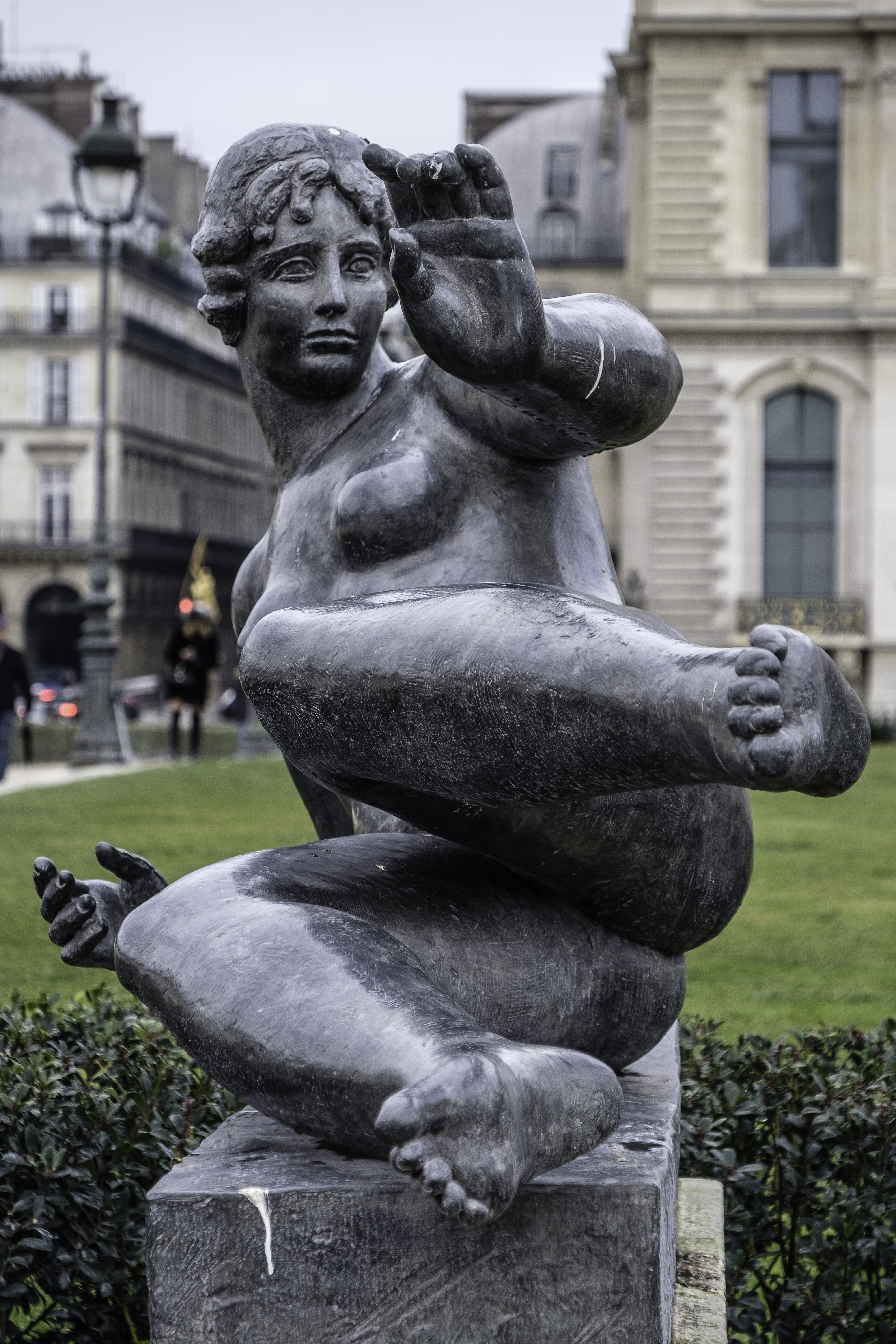 Het beeld Air van Aristide Maillol in de Jardin des Tuileries in Parijs